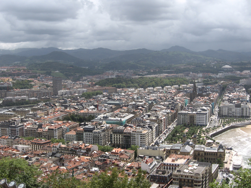 Donostiako erdigunea. Gipuzkoa, Euskal Herria. Center of Donostia-Saint Sebastian. Gipuzkoa, Basque Country.